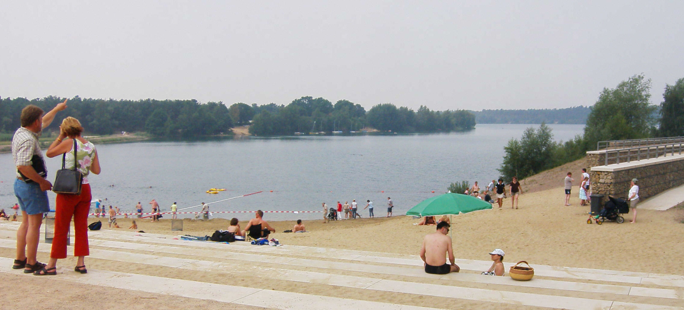 Blick auf den Offlumer See mit Strandpromenade und Badestelle. Neuenkirchen (Kreis Steinfurt); Eröffnungsfeier Regionale 2004, Projekt: Sprung über die Kiesbank